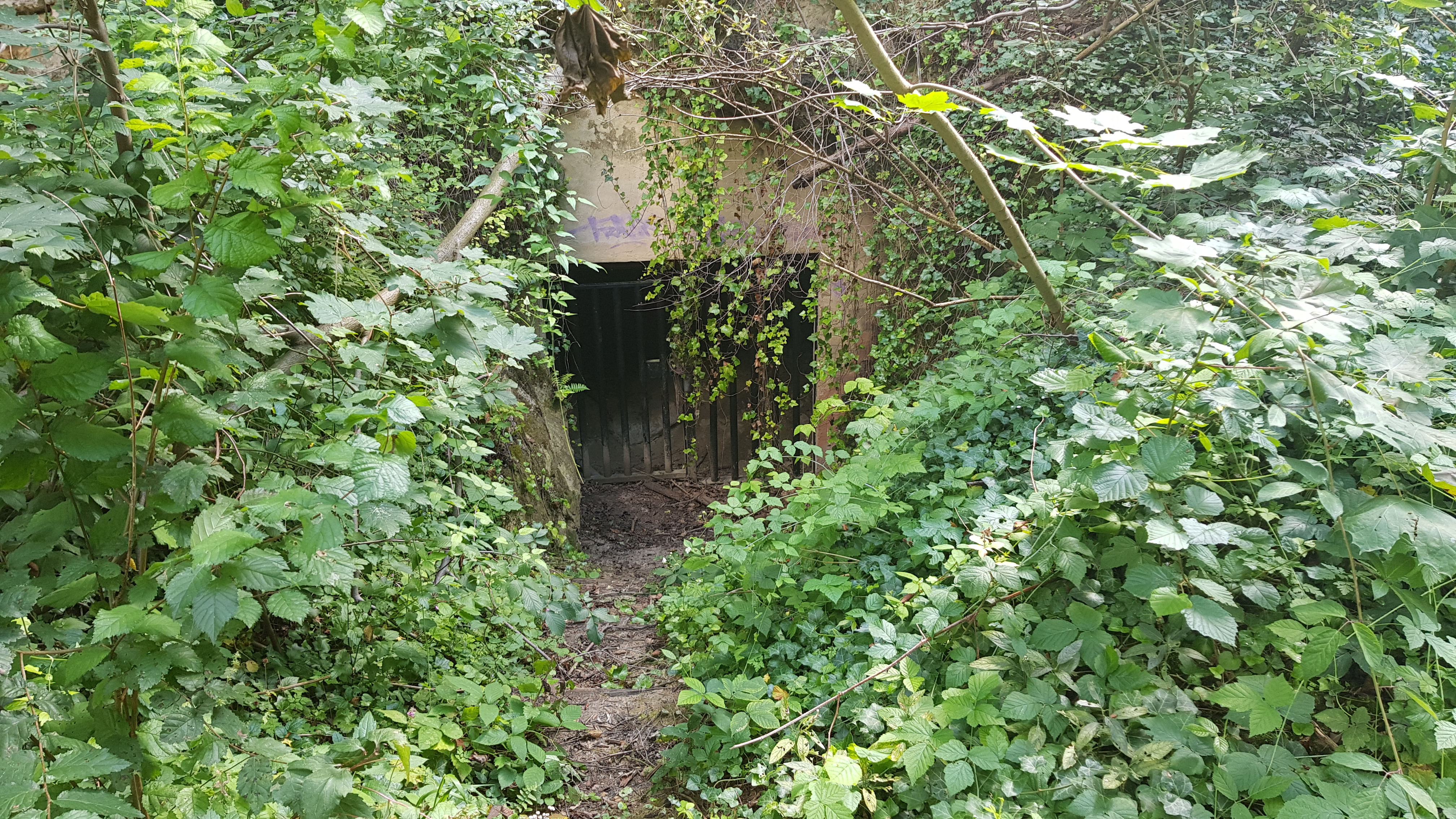 Vlaberggroeve, Geulhem, Nederland